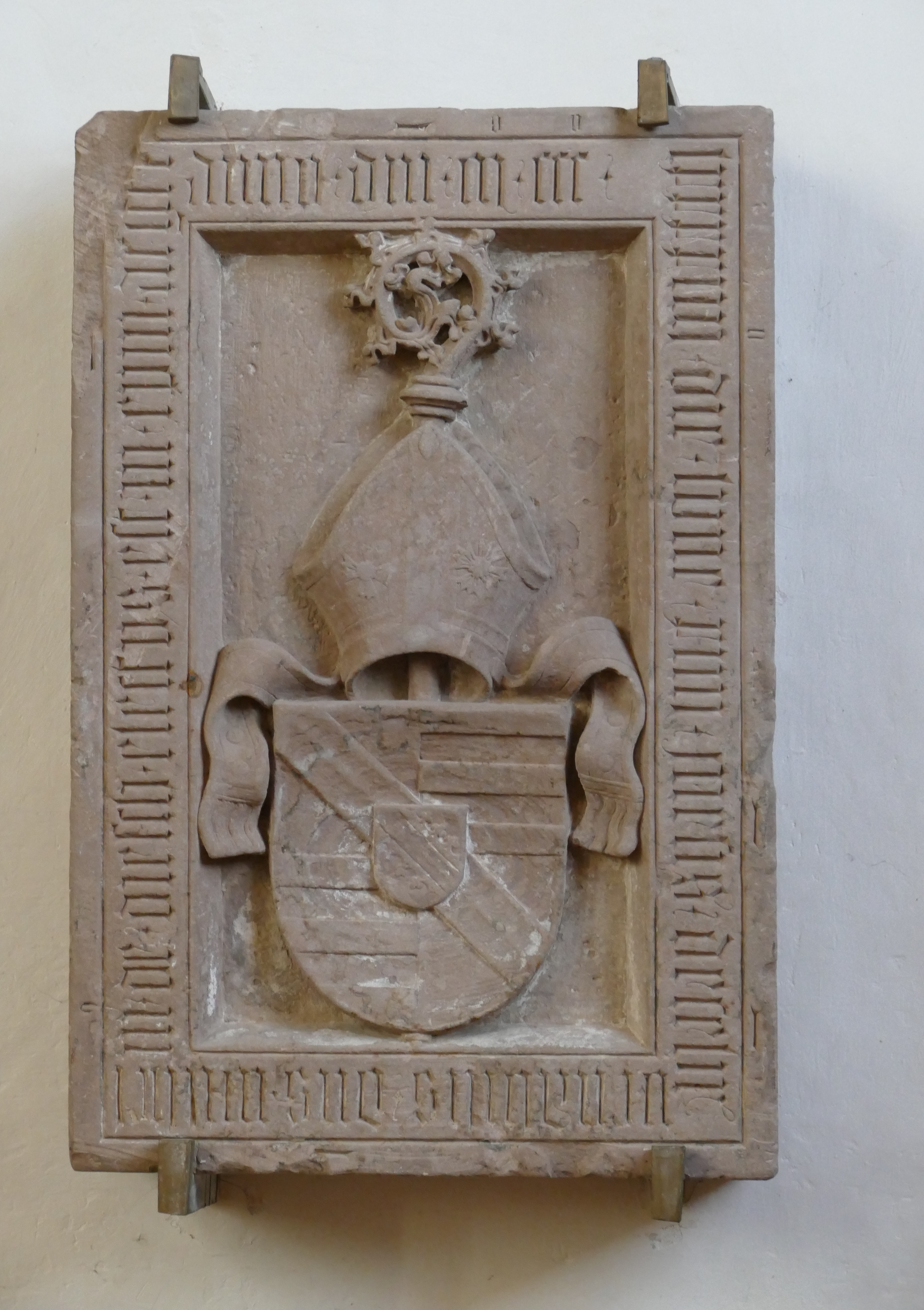 Alsace, Bas-Rhin, Église Saint-Georges de Molsheim, ancienne église des Jésuites (1618) (PA00084798, IA67006097).Dalle commémorant l'élection de Guillaume de Diest au siège épiscopal de Strasbourg (1394)